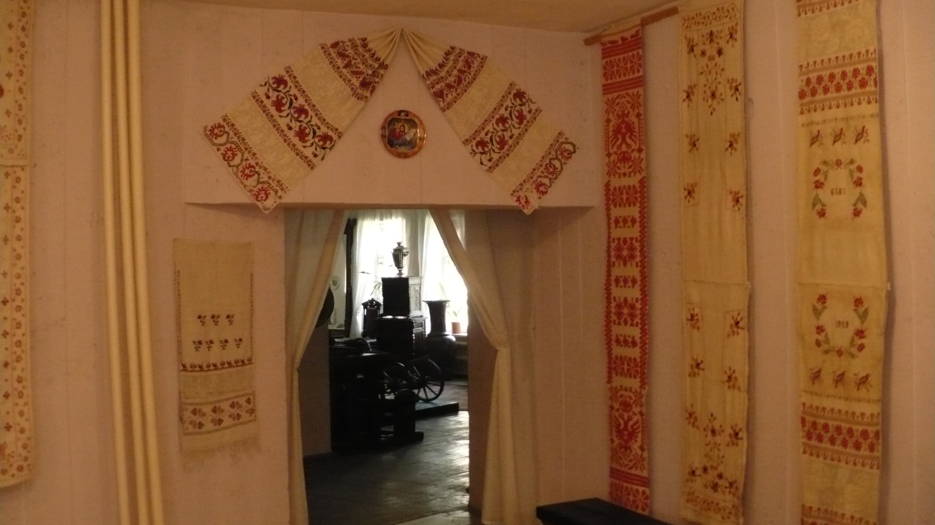 Миргородський Краєзнавчий музей (усередині 11). Внутрішній вигляд Миргородського Краєзнавчого музею